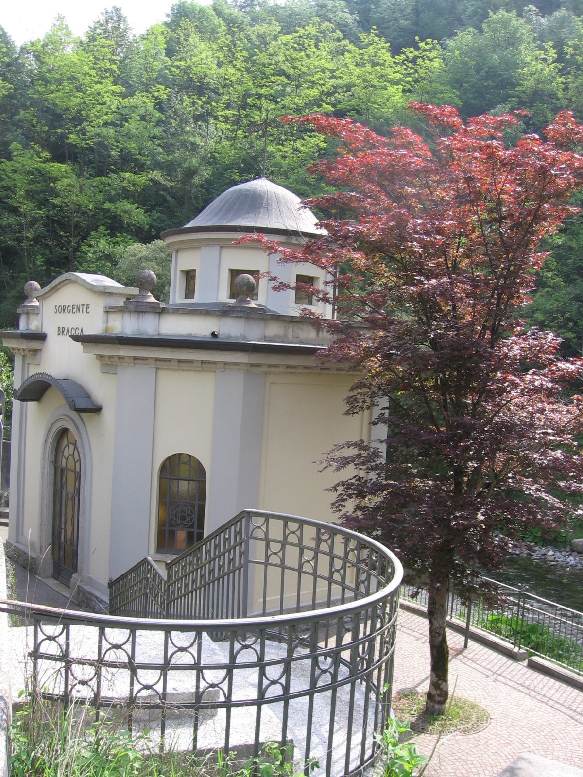 sorgenti di Bracca, Bergamo, Italia